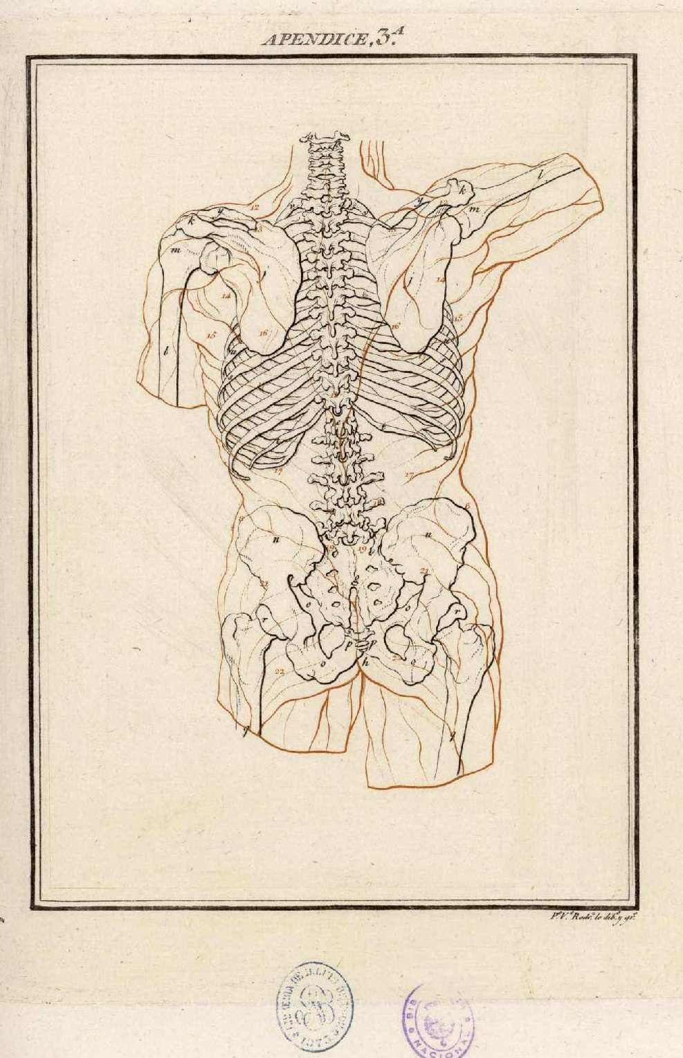 Varia comensuracion de Juan Arfe y Villafañe... Nueva edicion corregida, aumentada y mejorada con estampas finas / por ... Josef Assensio y Torres y compañia, Madrid, en la Imprenta Real, 1806. Biblioteca Nacional de España, ER/3961. Las láminas llevan firmas de diversos grabadores trabajando para Asensio.